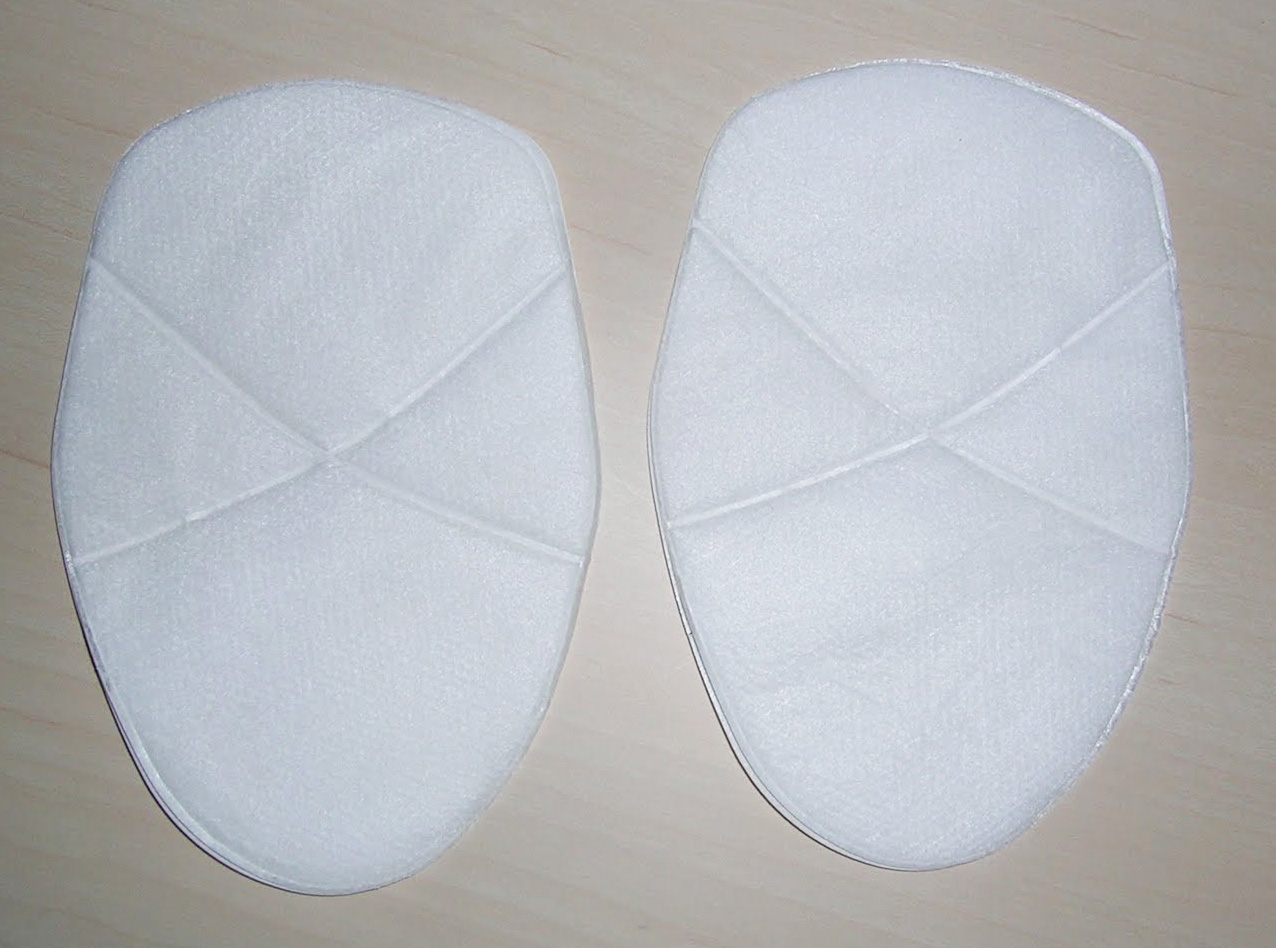 Beispiel von Achselpads, wie sie aussehen können.